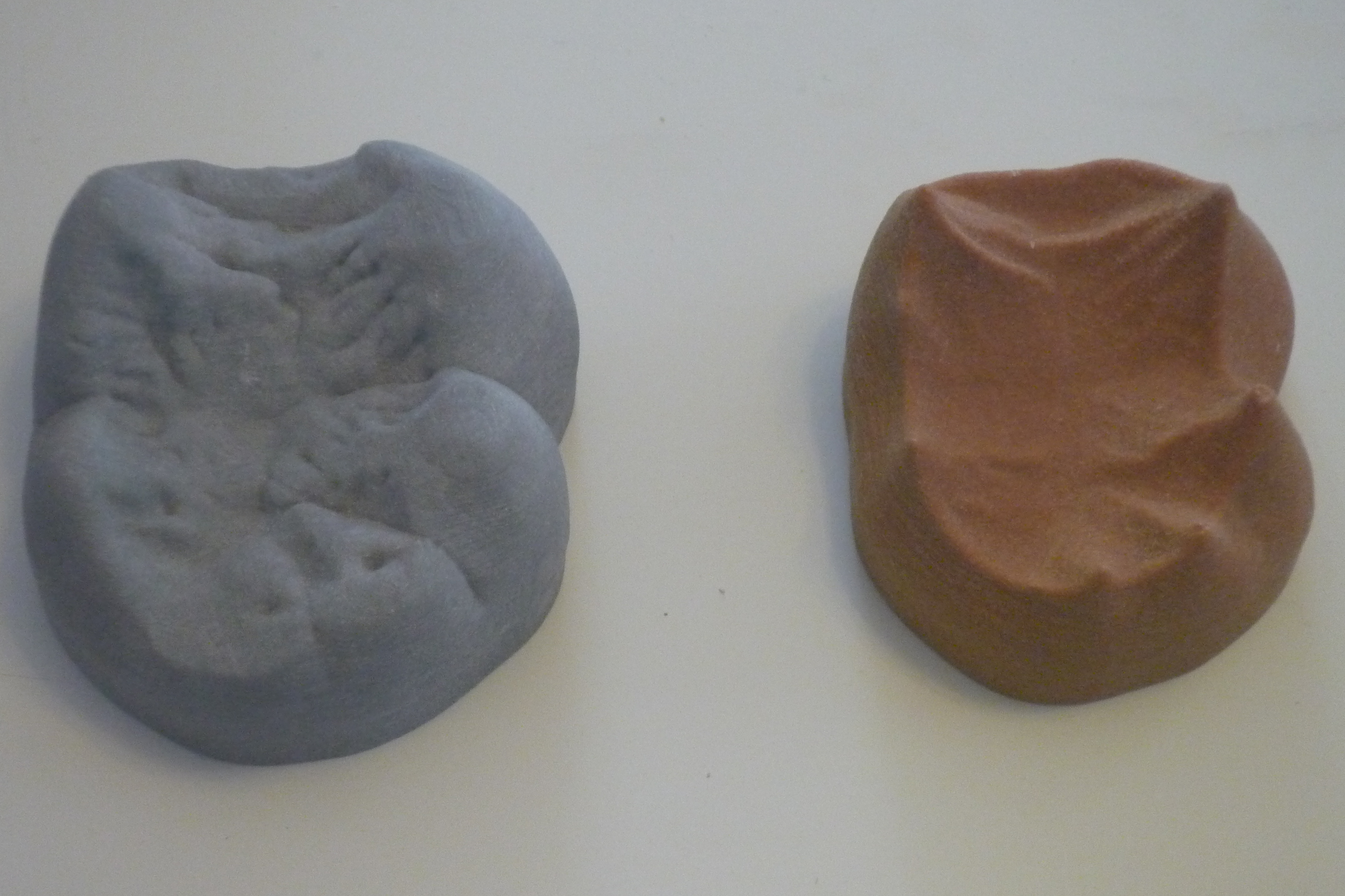 3D-Ausdruck von Zahnkrone (links) und Zahnbein (rechts) eines unteren Backenzahns beim Schimpansen